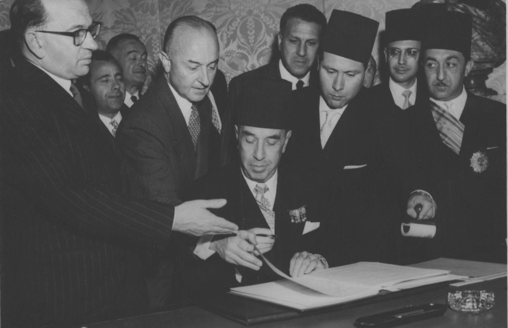 Signature des conventions de l'autonomie interne tunisienne à l'Hôtel Matignon (Paris) en juin 1955. Figurent de gauche à droite : Edgard Faure, Habib Chatti, inconnu, Badevans, Tahar Ben Ammar, Taoufik Ben Cheikh, Fathi Zouhir, Ahmed Mestiri et Mongi Slim